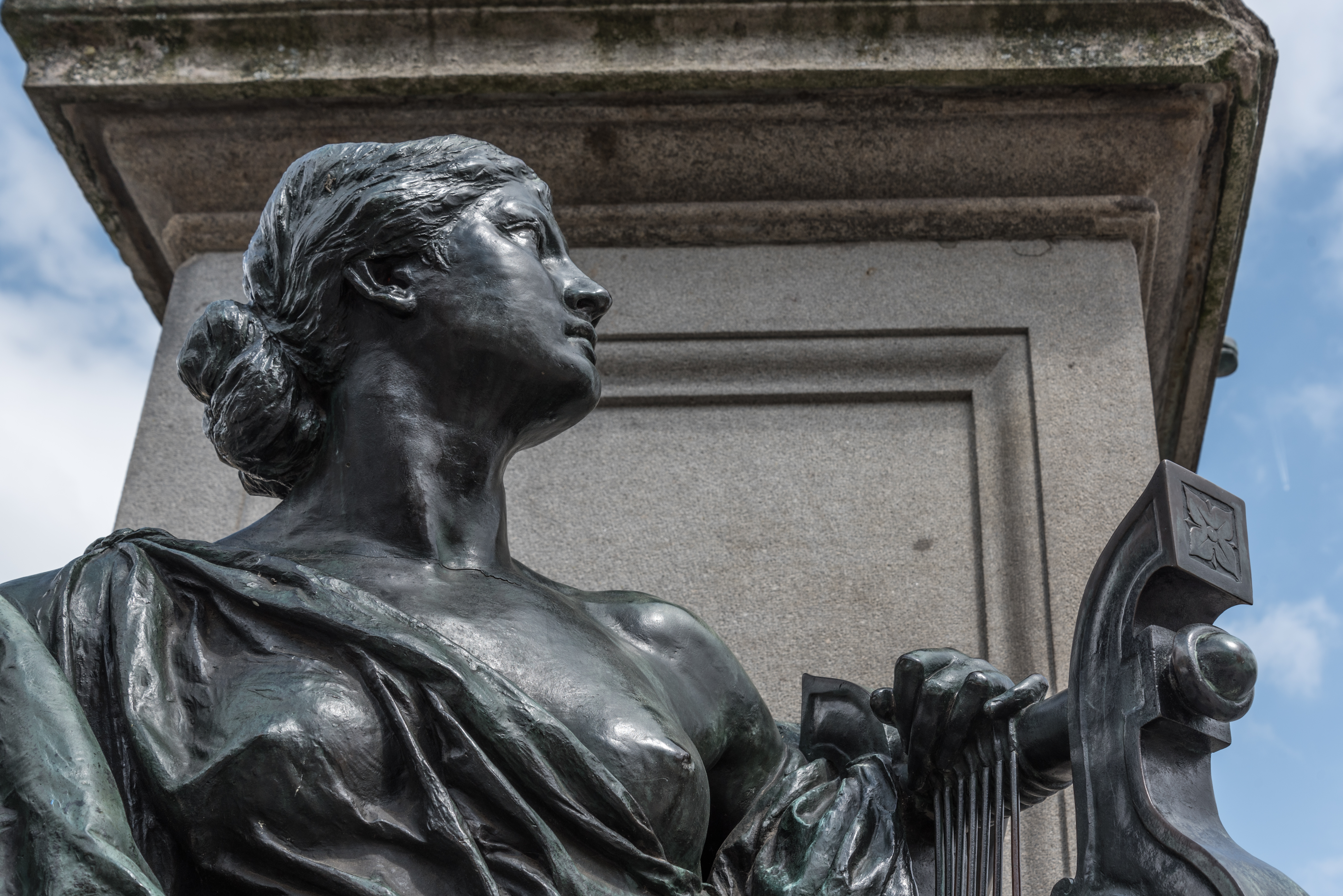 Schweinfurt, Markt, Friedrich-Rückert-Denkmal